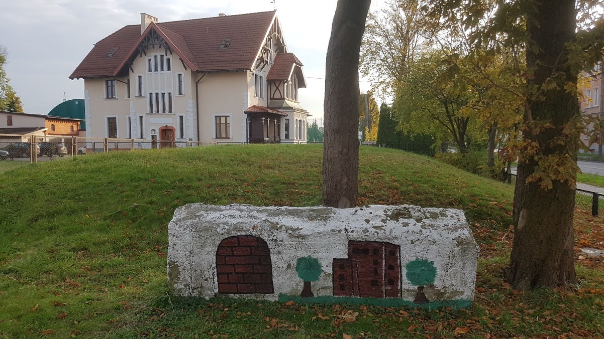 Braniewo Wasserturm wieża wodna ruiny architekt Kurt Frick